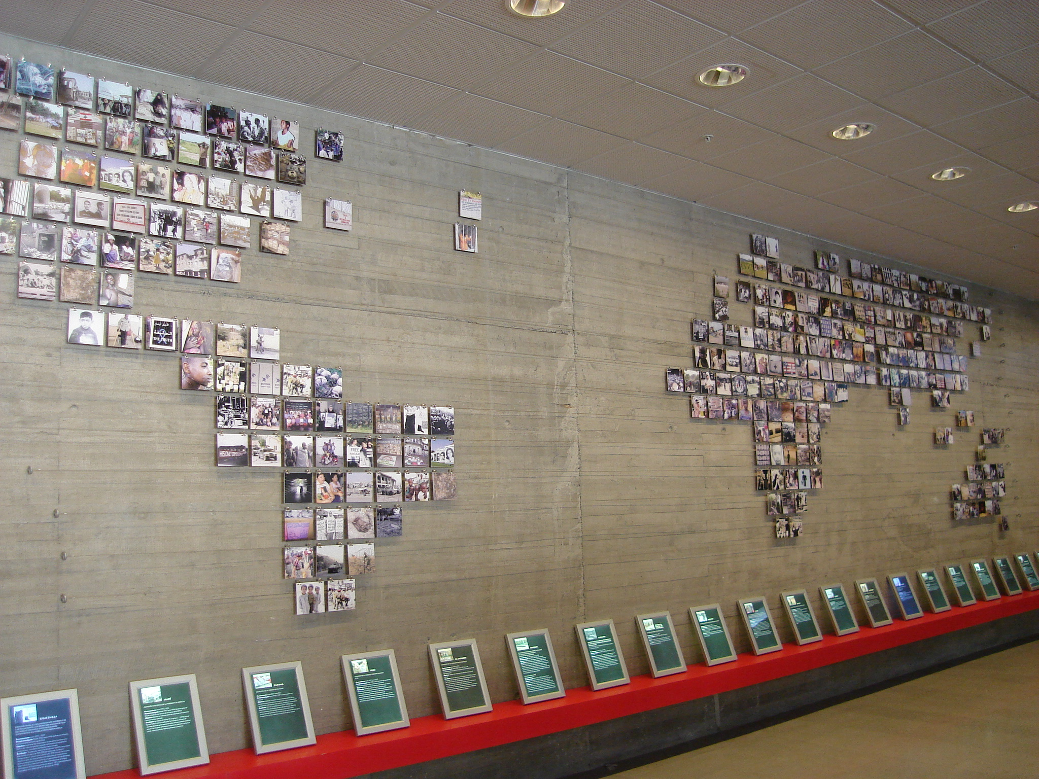 Sala "Derechos Humanos, desafío universal" en Museo de la Memoria, en Santiago de Chile.